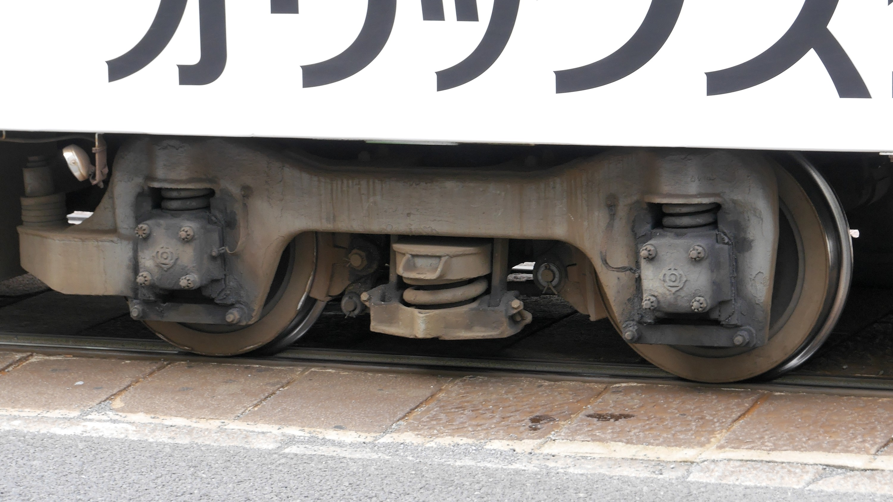 長崎電気軌道1300形の日立製作所・KL-11型台車。元々は西日本鉄道福岡市内線300形に装着されていたもの。